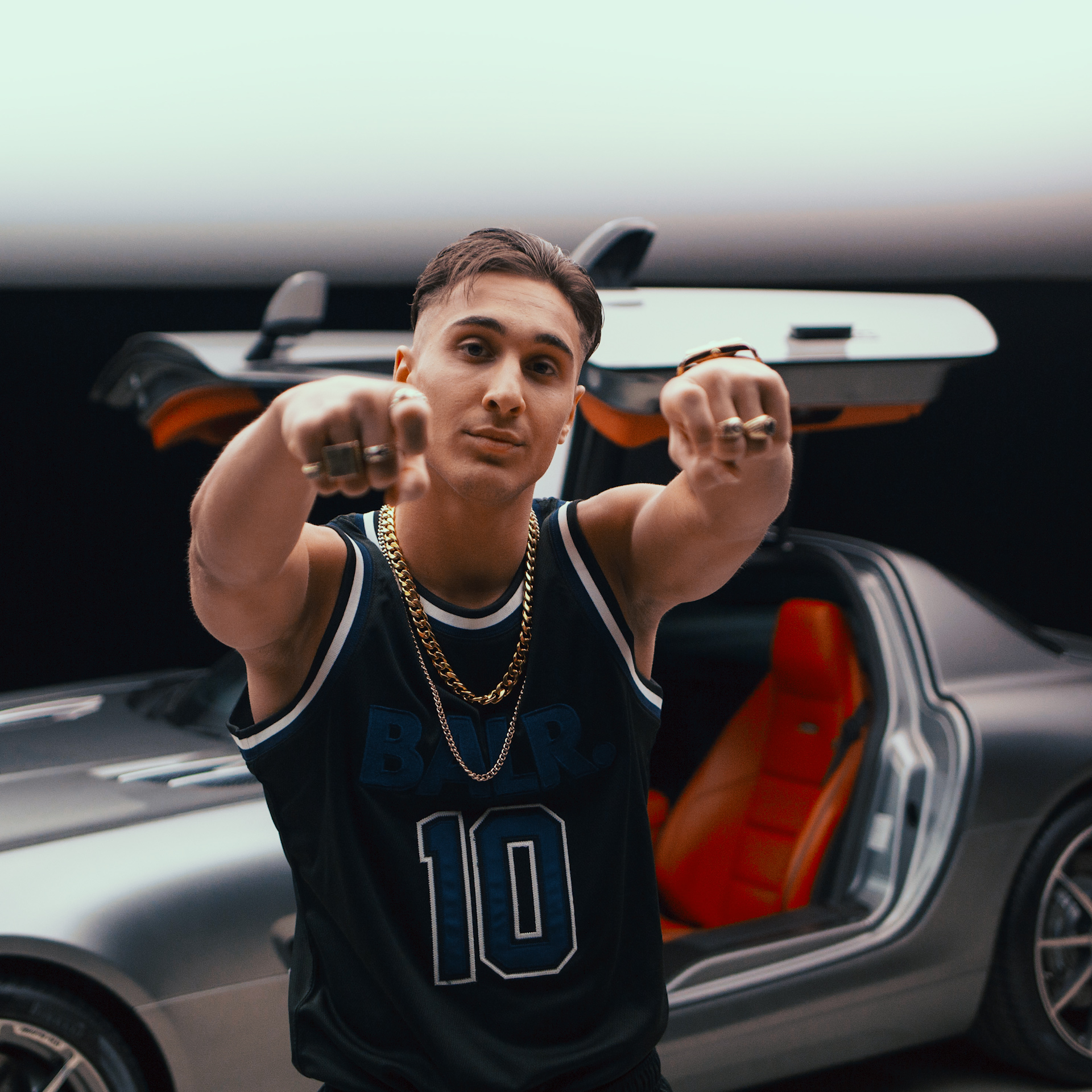 Pressefoto des Rappers Sero El Mero